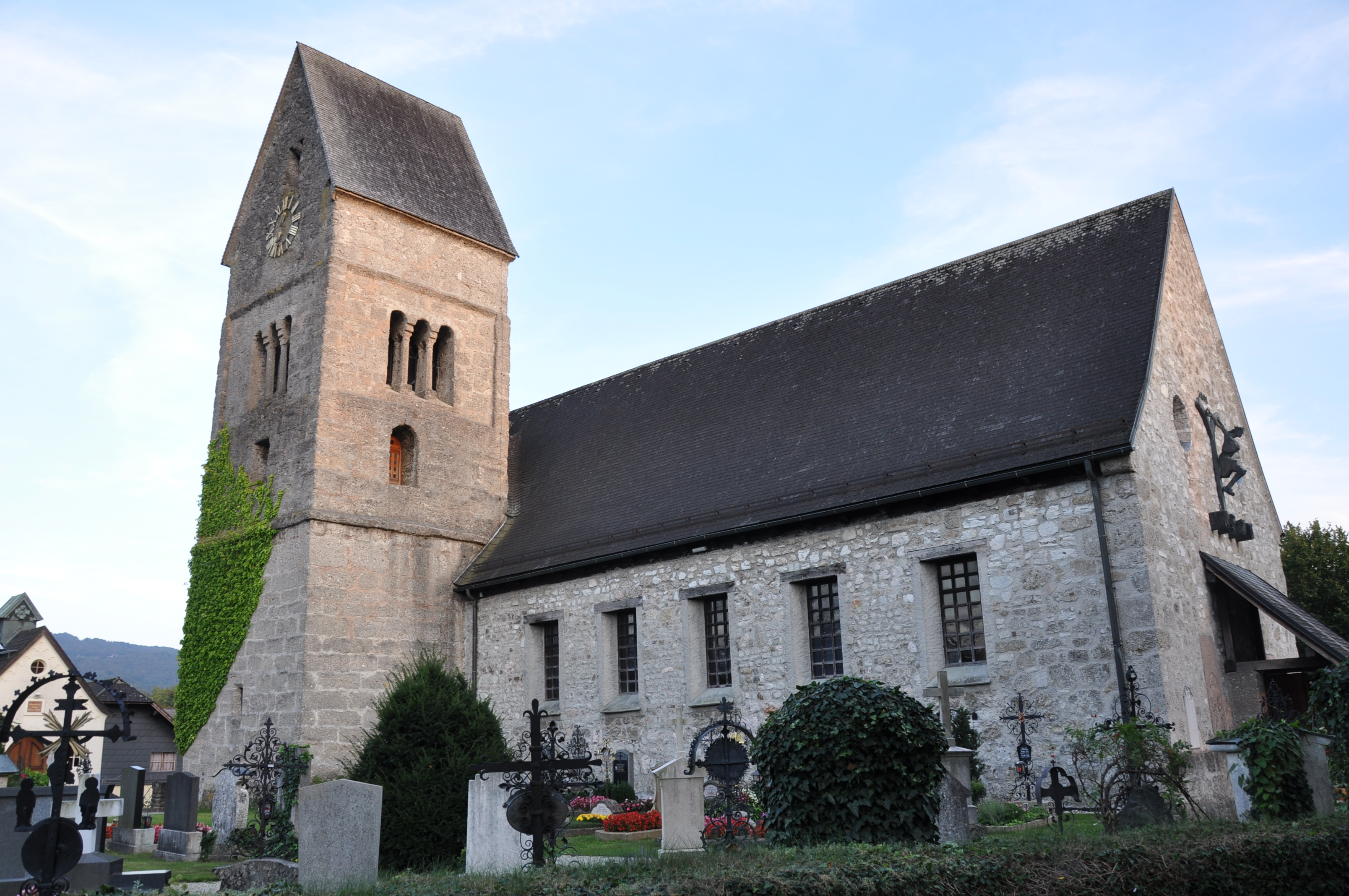 Pfarrkirche des heiligen Oswald in Anif